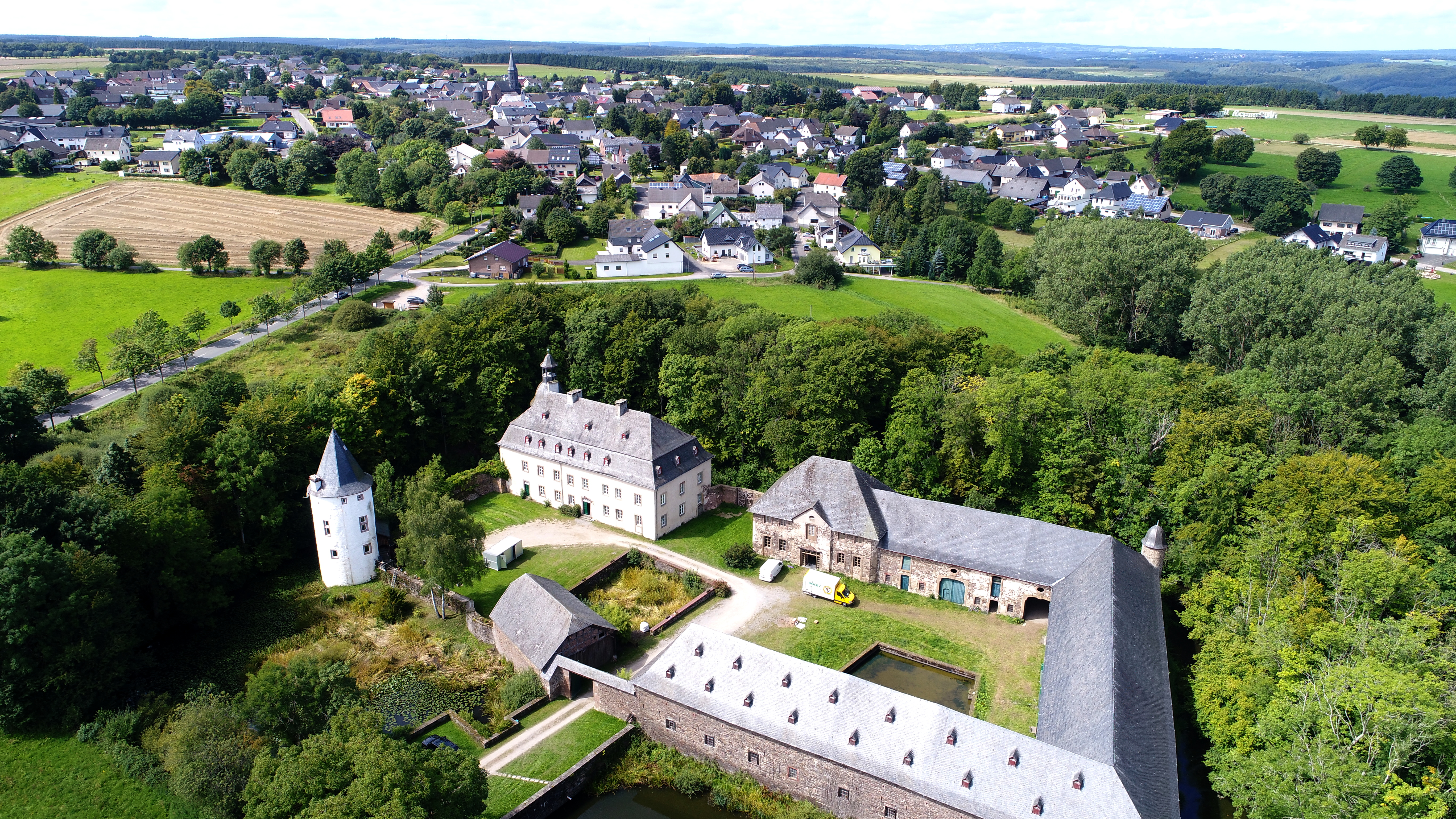 Dreiborn, Luftaufnahme (2017)